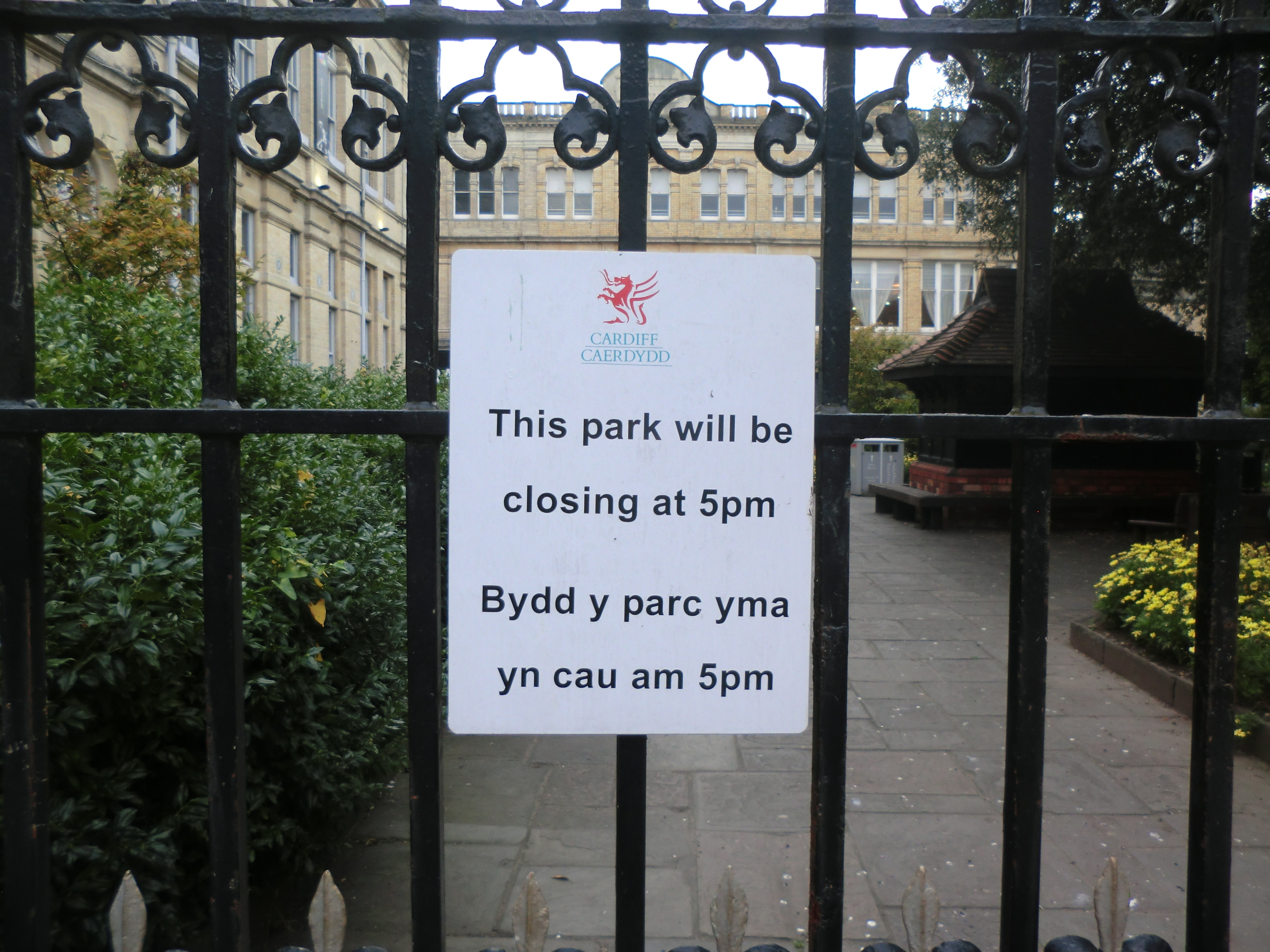 Warnhinweise am Eingangstor zum Park